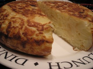 Totilla española o de patatas. Foto frontal mostrando corte